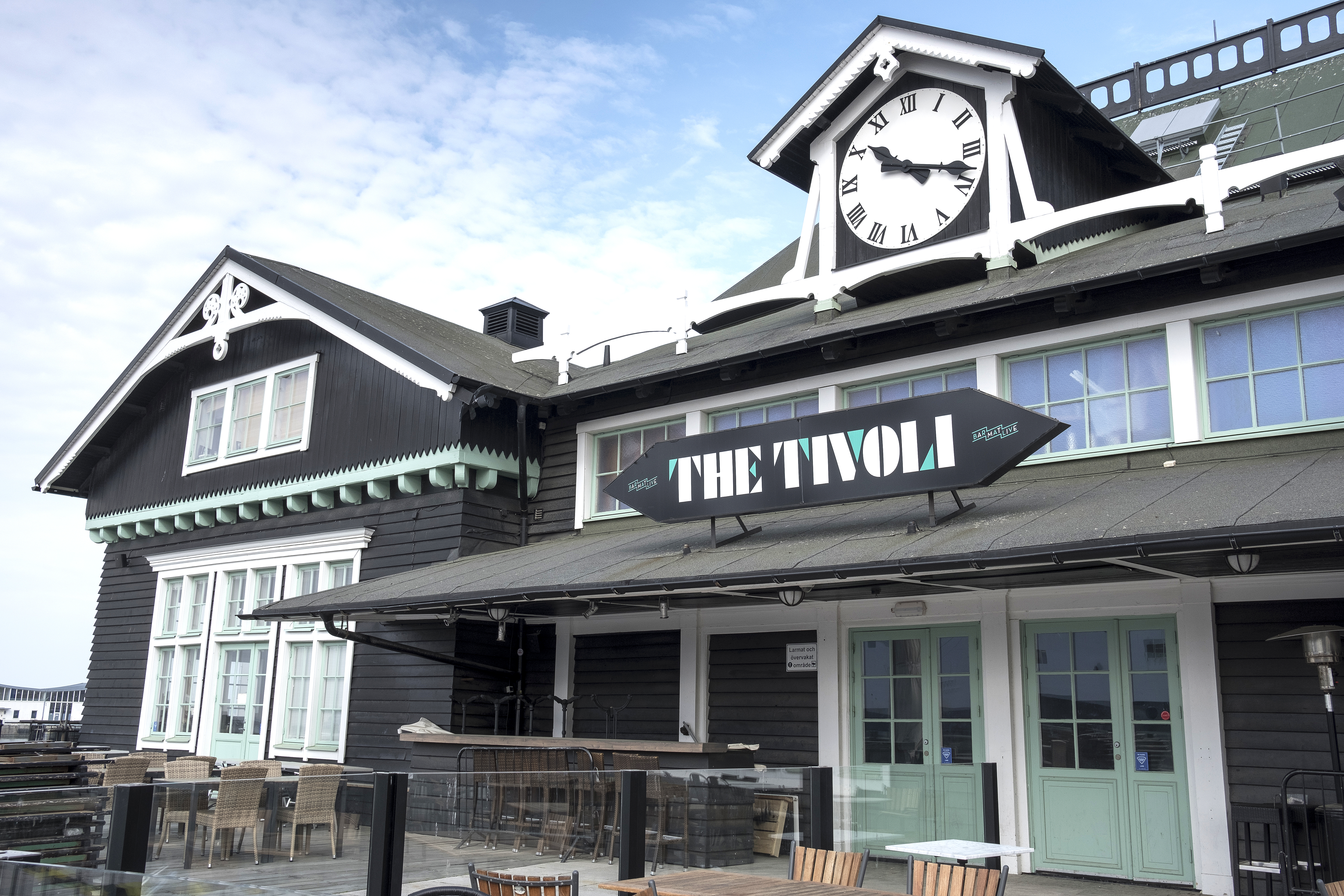 Nöjeshuset The Tivoli i Helsingborgs hamn fotograferat 20190430. Photo: News Øresund - Johan Wessman © News Øresund - Johan Wessman (CC BY 3.0) Detta verk av News Øresund är licensierat under en Creative Commons Erkännande 3.0 Unported-licens (CC BY 3.0). Bilden får fritt publiceras under förutsättning att källa anges. .The picture can be used freely under the prerequisite that the source is given. News Øresund, Malmö, Sweden News Øresund är en oberoende regional nyhetsbyrå som är en del av det oberoende dansk-svenska kunskapscentrat Øresundsinstituttet.